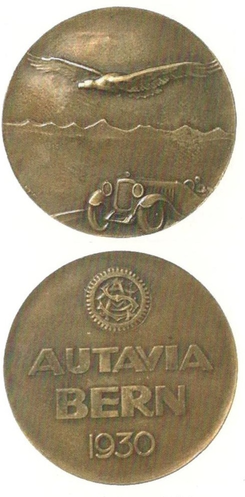 Münze der Veranstaltung Autavia Bern 1930, Bronze, 40mm, 26g